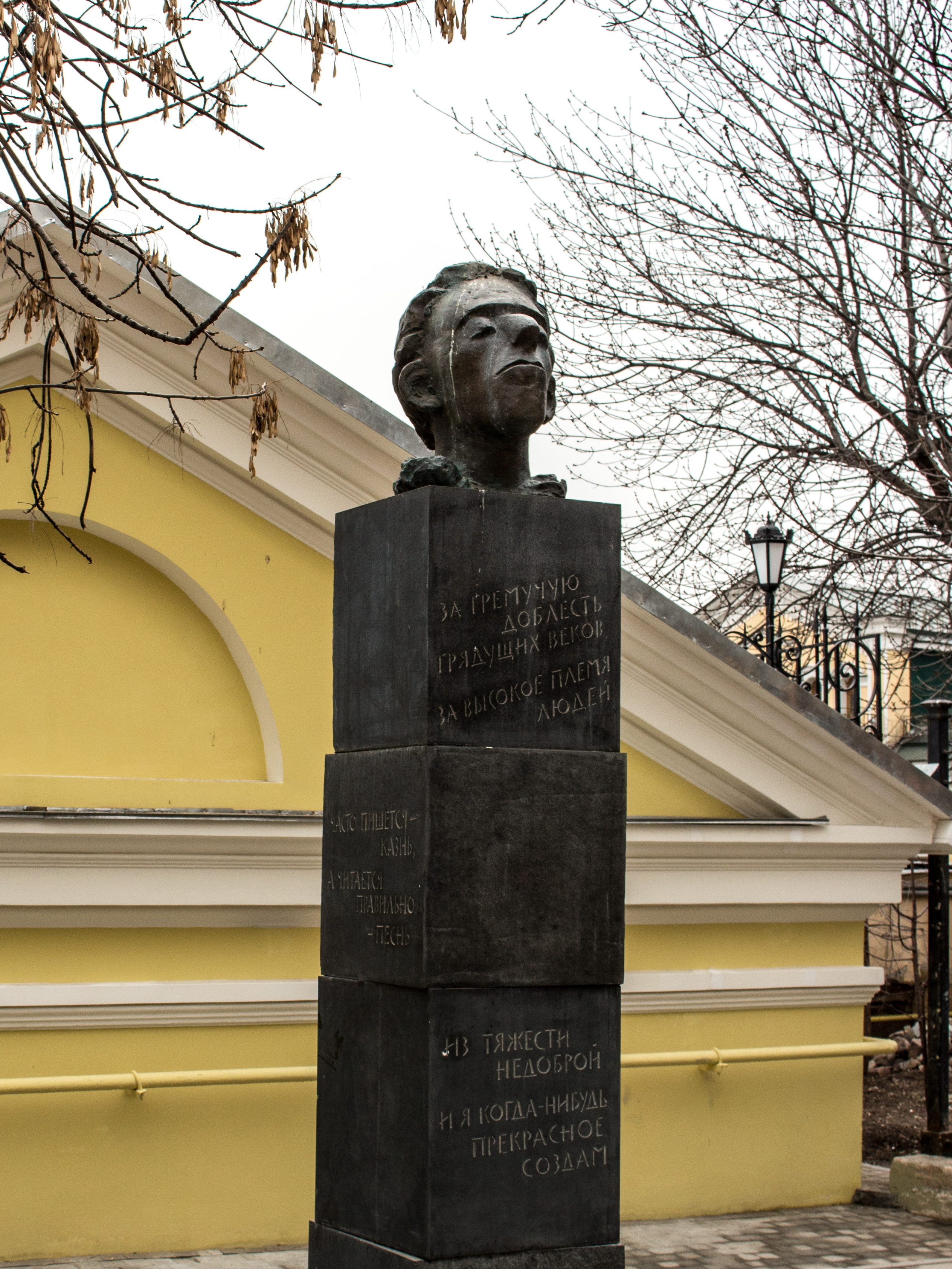 Памятник Осипу Мандельштаму в Старосадском переулке в Москве